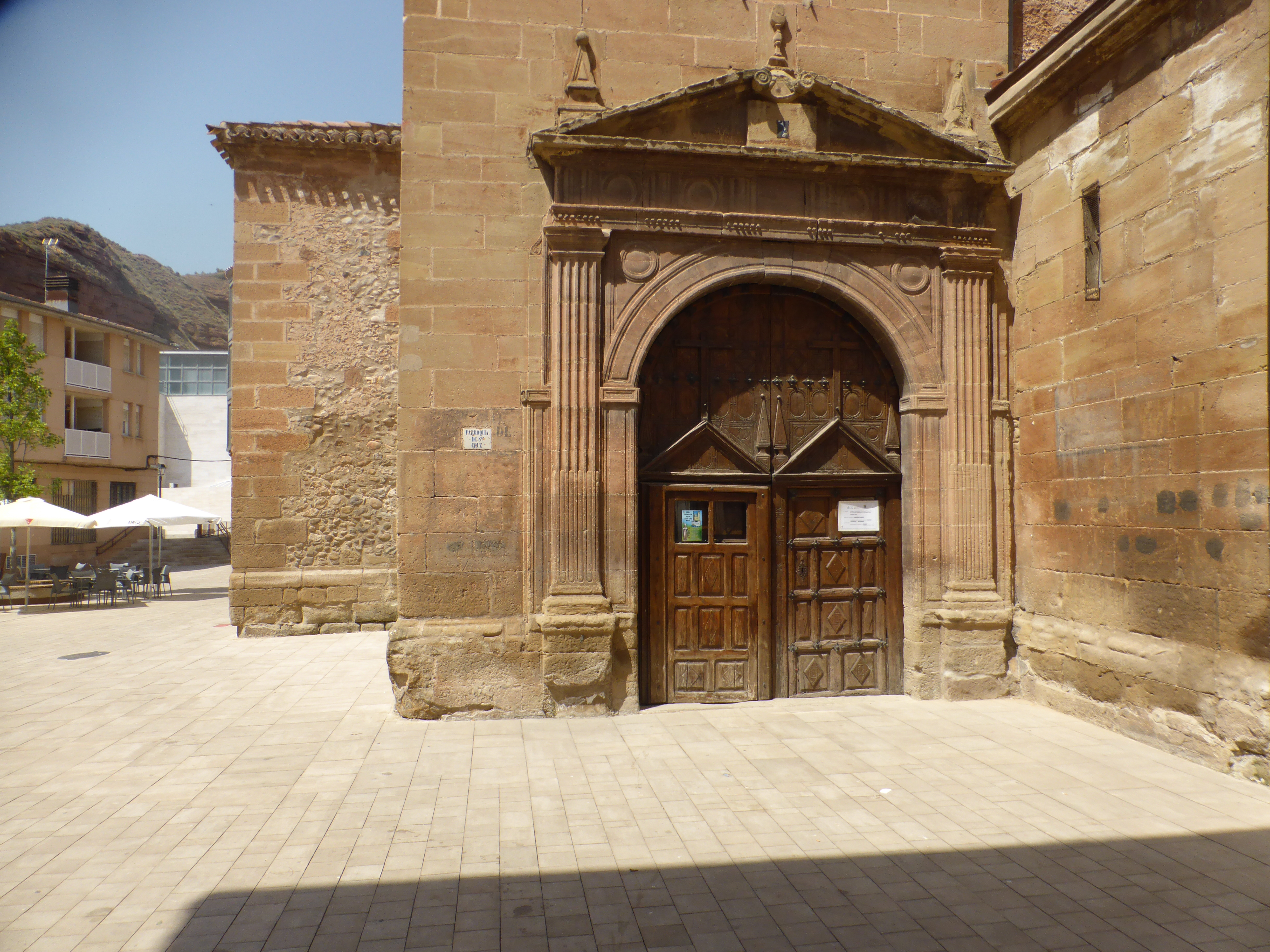 Puerta de entrada de la Parroquia de la Santa Cruz.